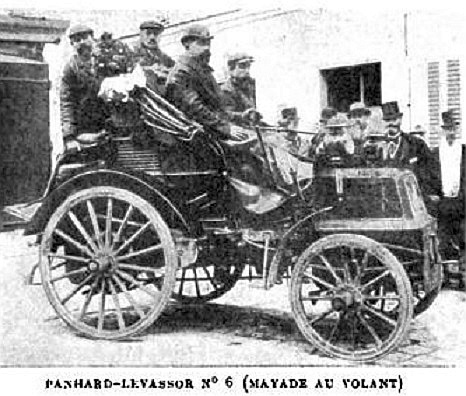 La Panhard-Levassor n°6 d'Émile Mayade, vainqueur de Paris-Marseille-Paris 1896, Histoire de l'automobile, Pierre Souvestre, éd. H. Dunod et E. Pinat, 1907 (ASIN B001BPBE58) p.312